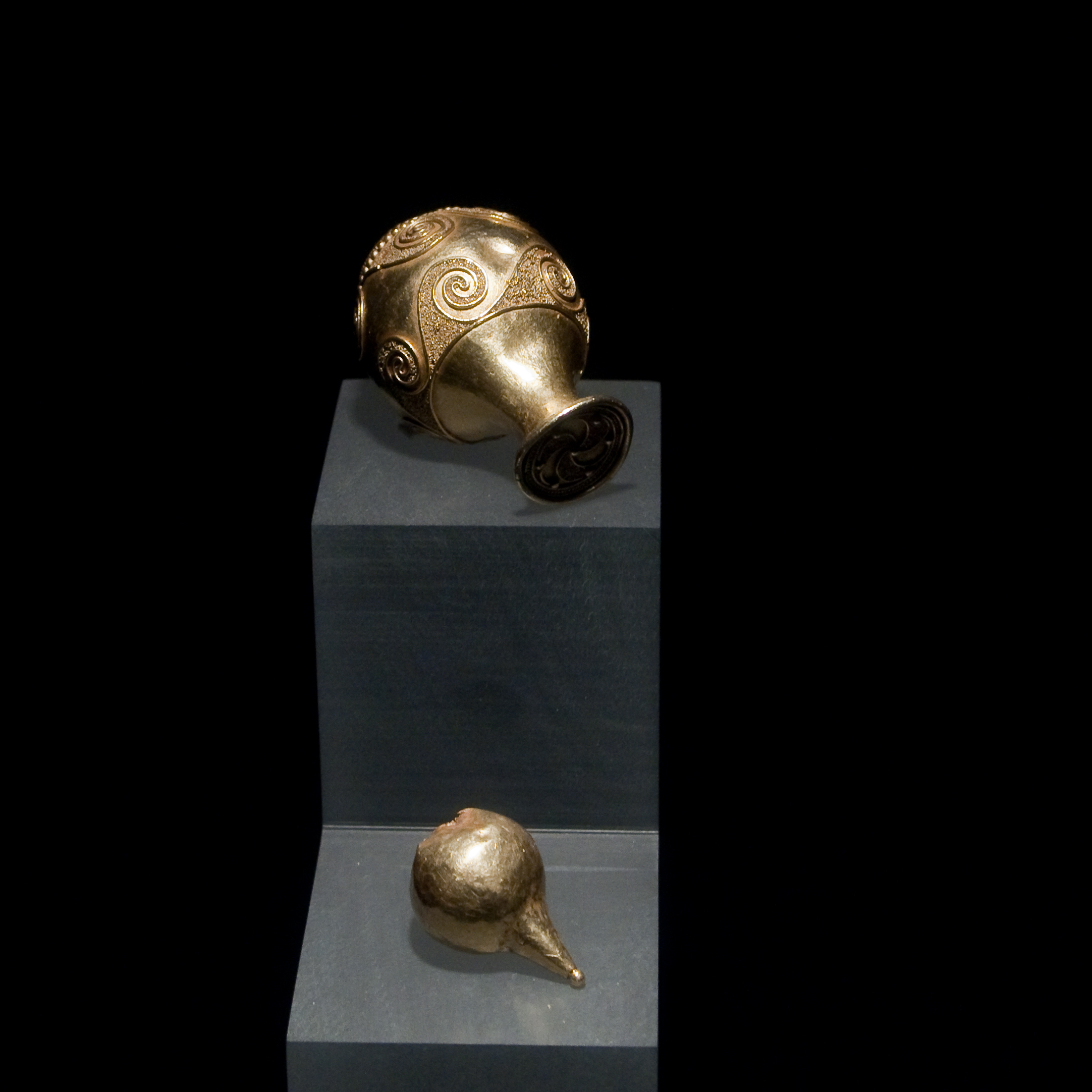 Castro de Santa Trega - remates de torques